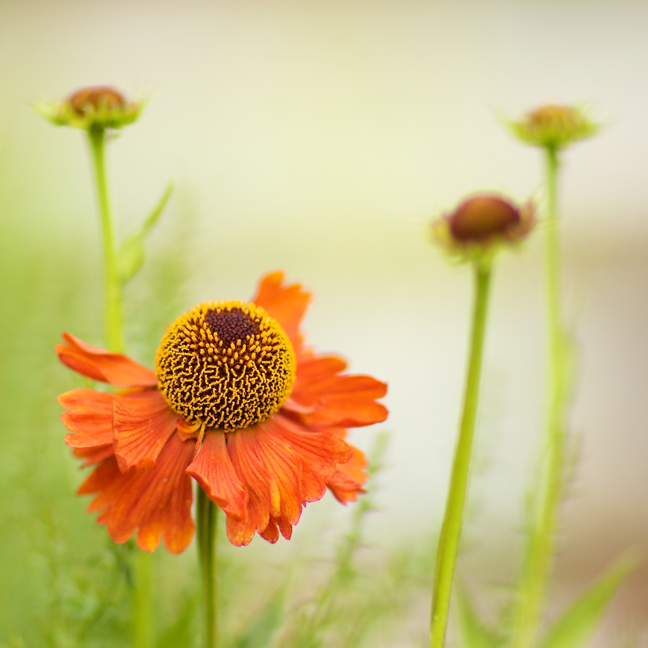 Helenium hybrid "Moerheim Beauty" View Large